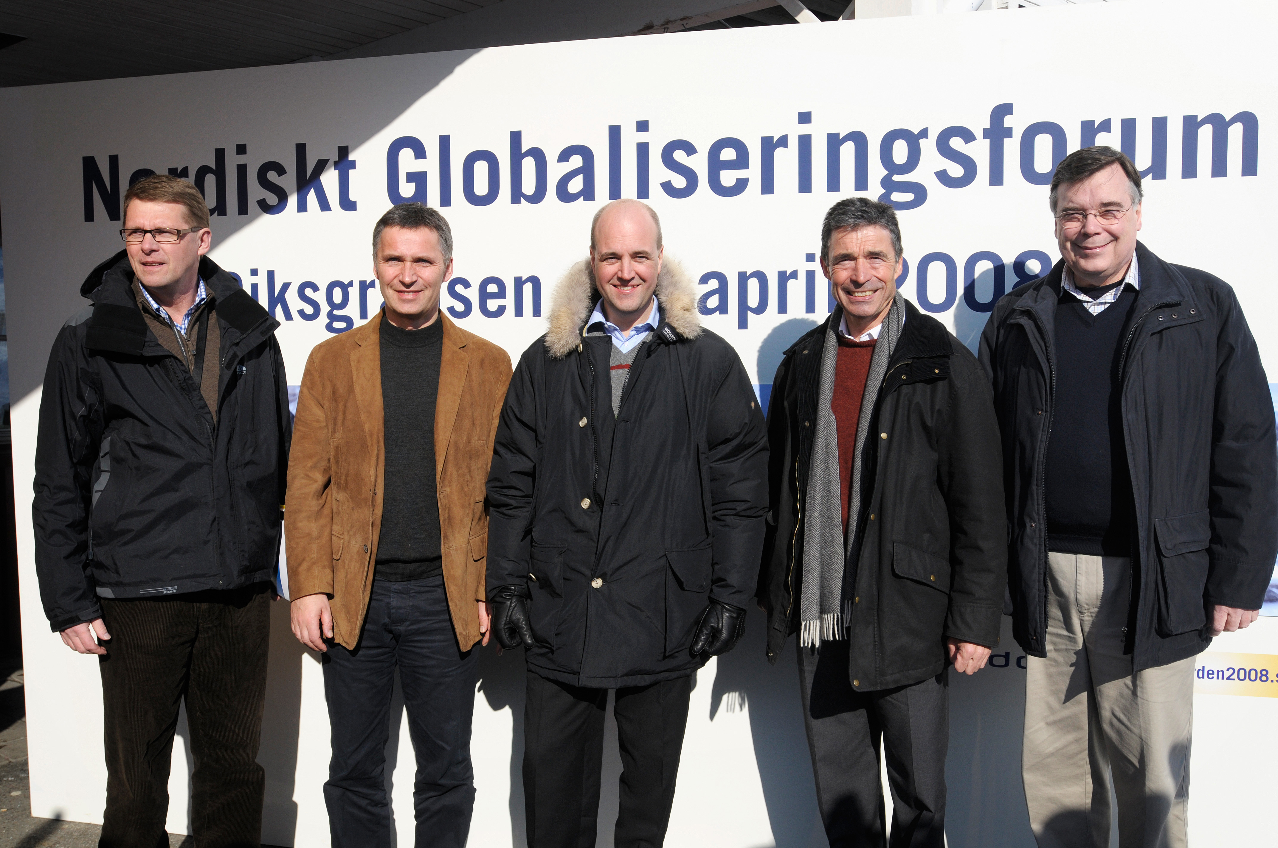 De nordiska statsministrarna samlade på nordiskt globaliseringsforum i Riksgränsen. Matti Vanhanen, Jens Stoltenberg, Fredrik Reinfeldt, Anders Fogh Rasmussen och Geir H. Haarde.